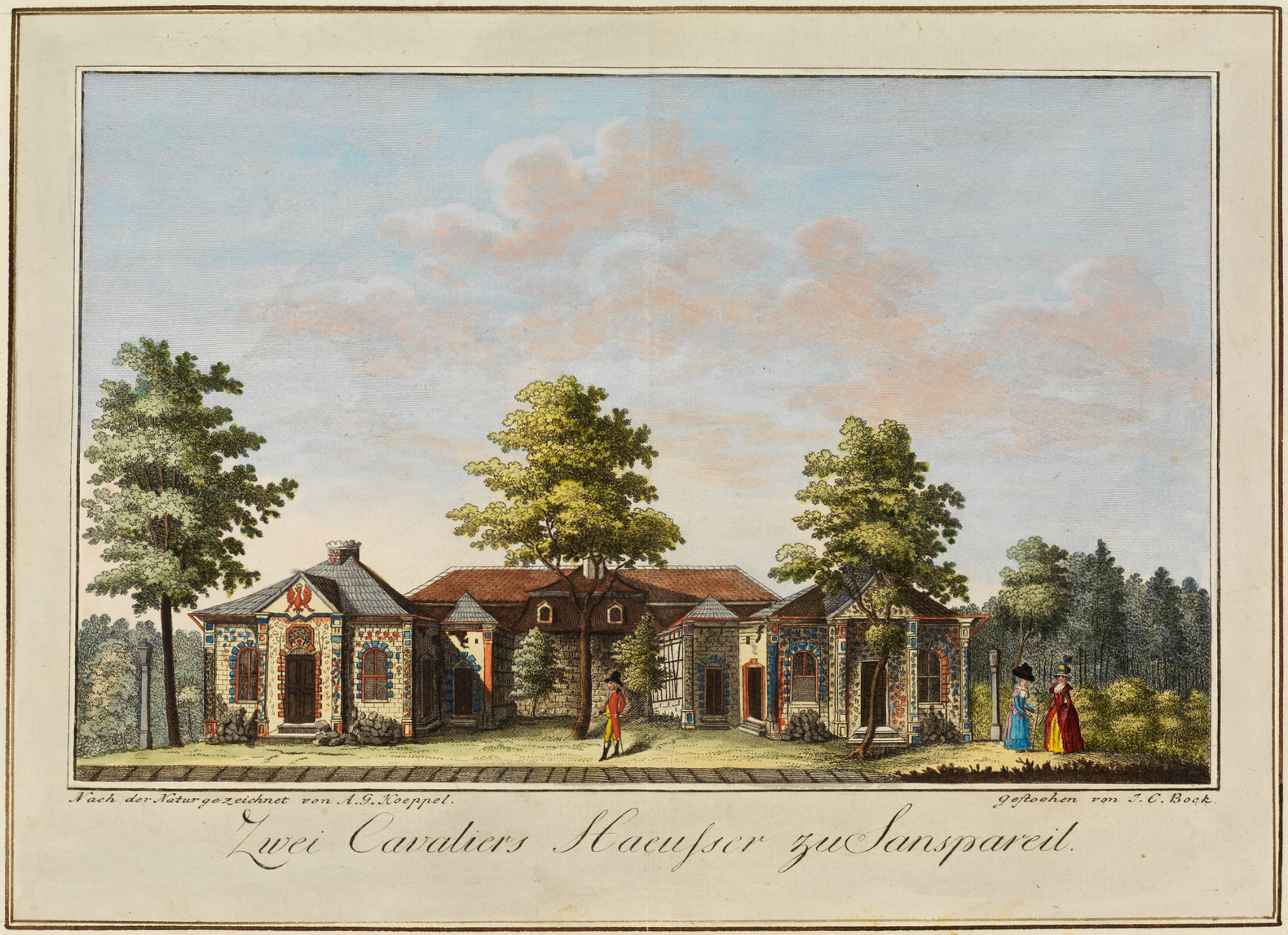 Von J. C. Bock gestochene Zeichnung von Johann Gottfried Köppel aus dem Buch Die Eremitage zu Sanspareil. Nach der Natur gezeichnet und beschrieben von Johann Gottfried Köppel. Kais. Landgerichts-Registrator zu Anspach. Erlangen. Verlegt von Wolfgang Walther. 1793.